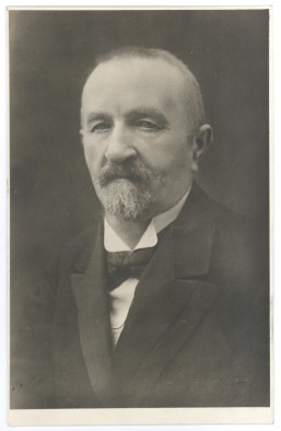 Eduard Berendts (1860–1930)